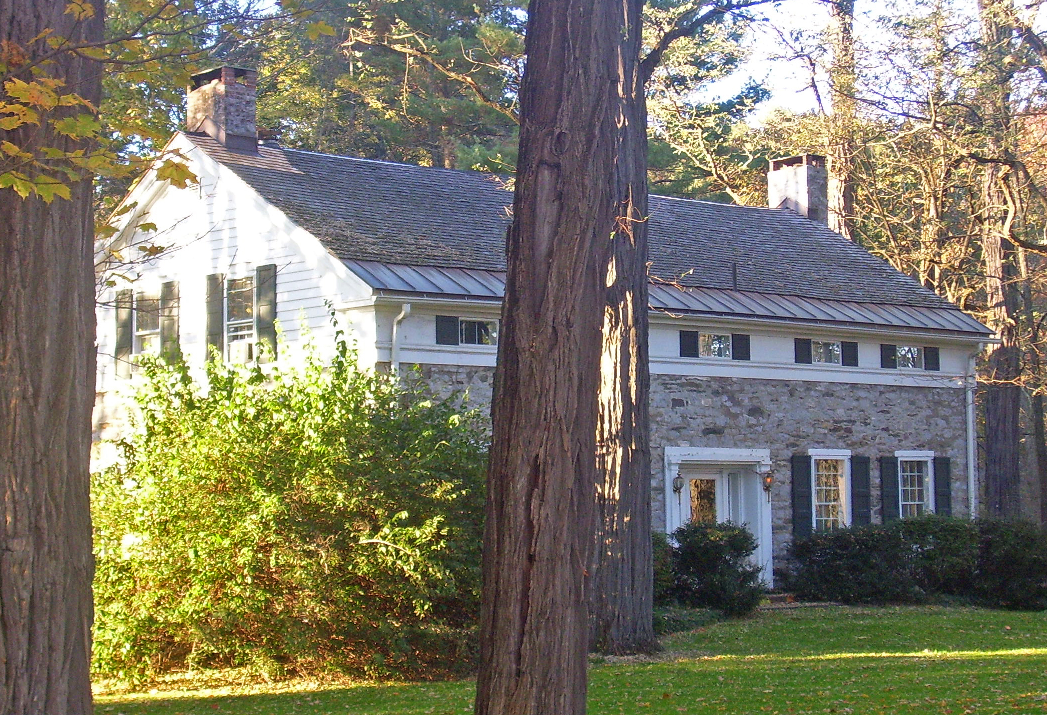 Dirck Westbrook Stone House